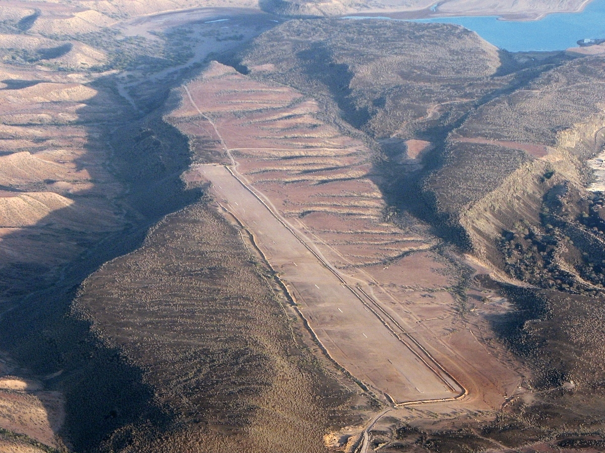 Délka dráhy 1000 metrů... proti dříve užívanému kamenitému letišťátku na břehu zálivu s délkou dráhy 620 metrů je toto úplná paráda...